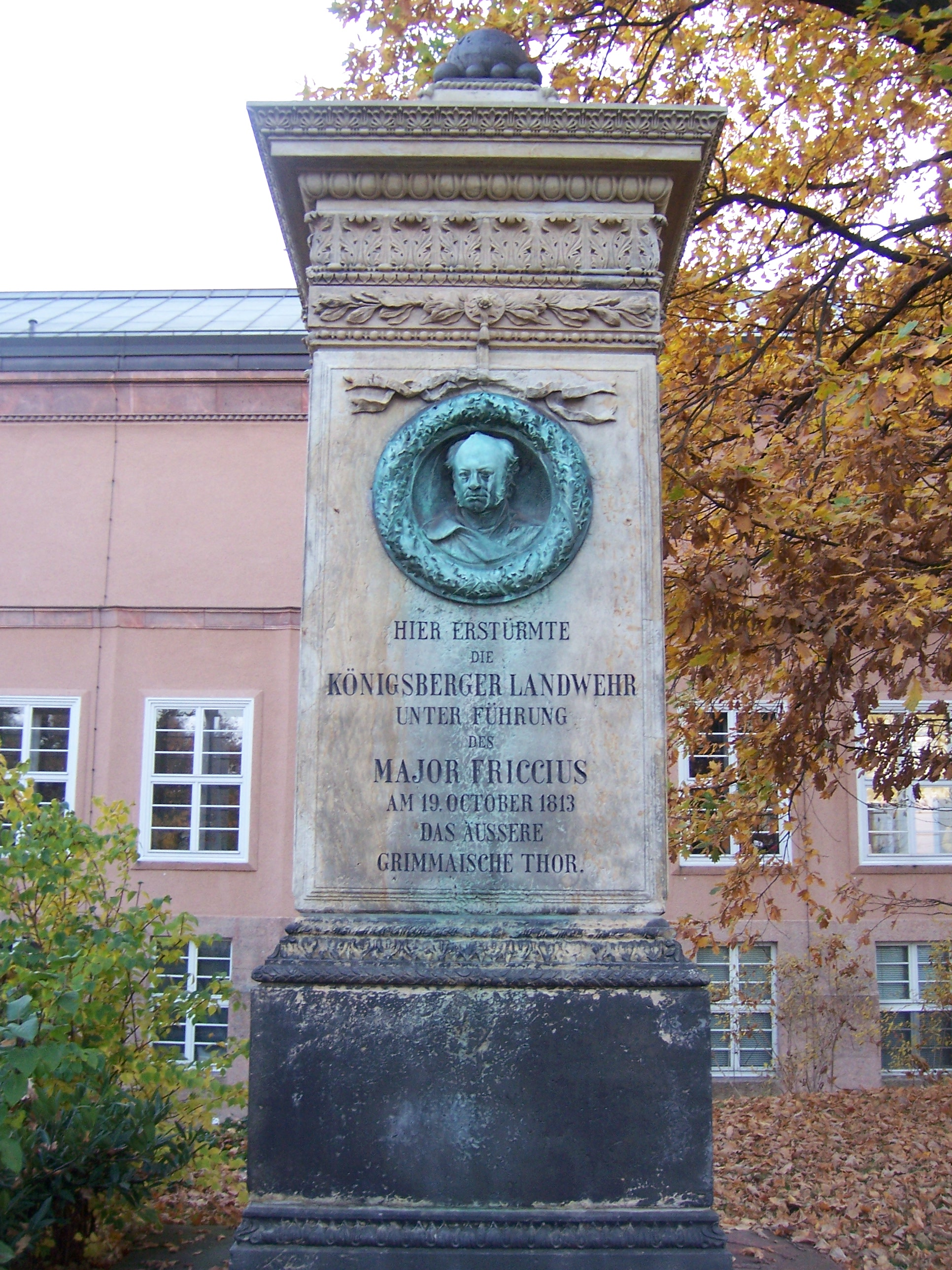 Denkmal für Karl Wilhelm Friccius